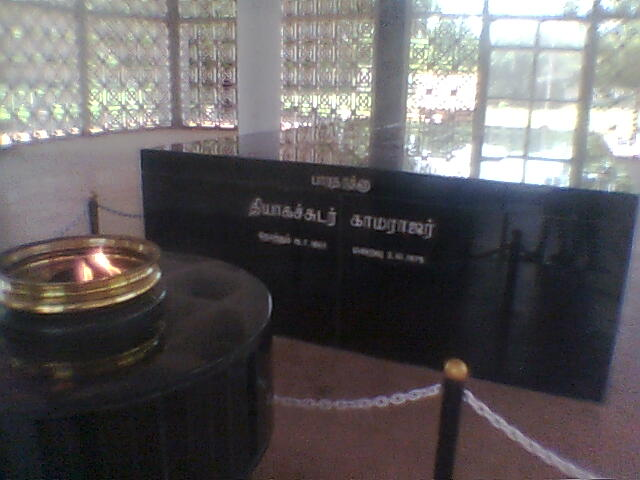 காமராஜர் சமாதி